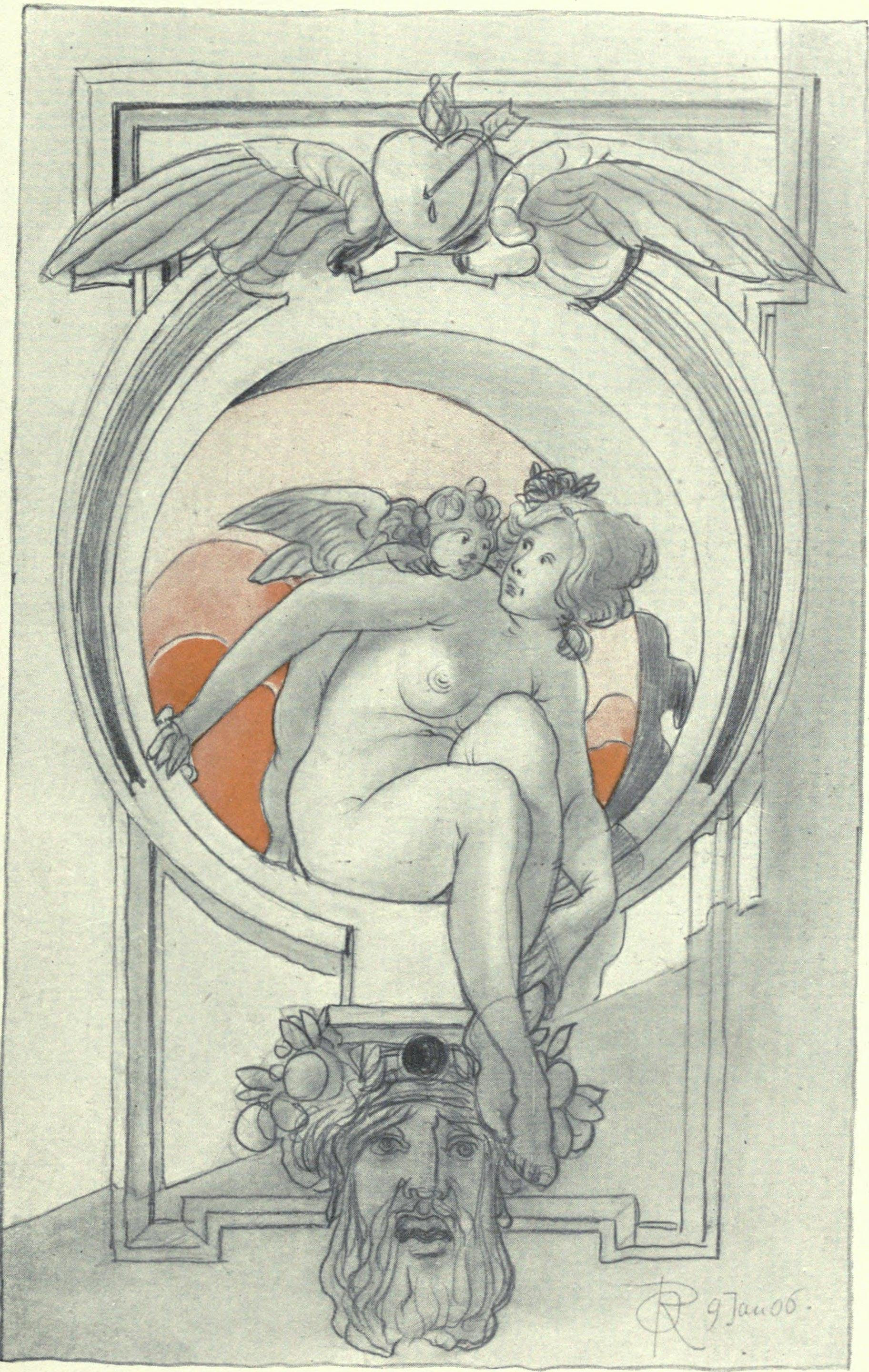 Dessin